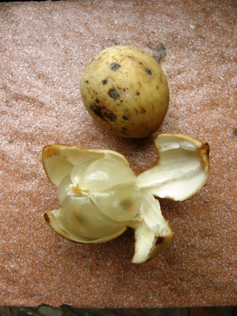 Duku Frucht geöffnet